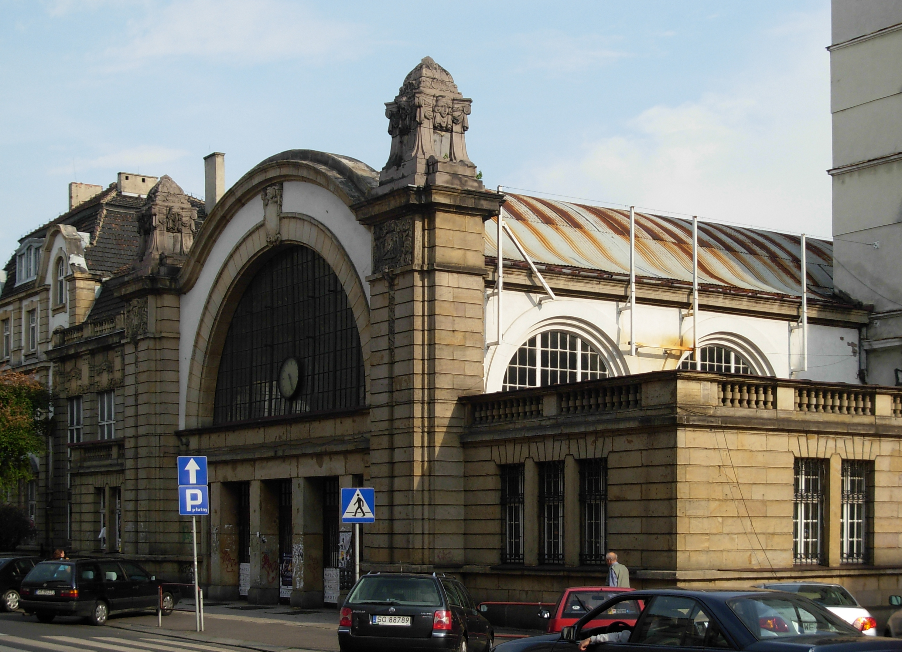 Katowice